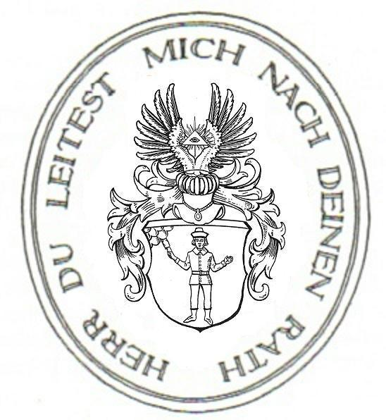 Wappen Jauch aus Sulza